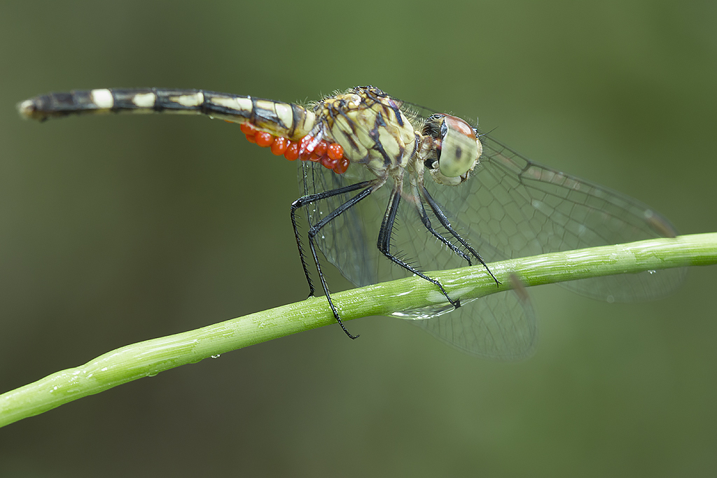 Local: Teodoro Sampaio/SP - Brasil Parque Estadual do Morro do Diabo Bioma: Mata Atlântica Acessórios: Tripé + Trilho Foco Macro + Cabo Disparador Remoto + Rebatedor Circular